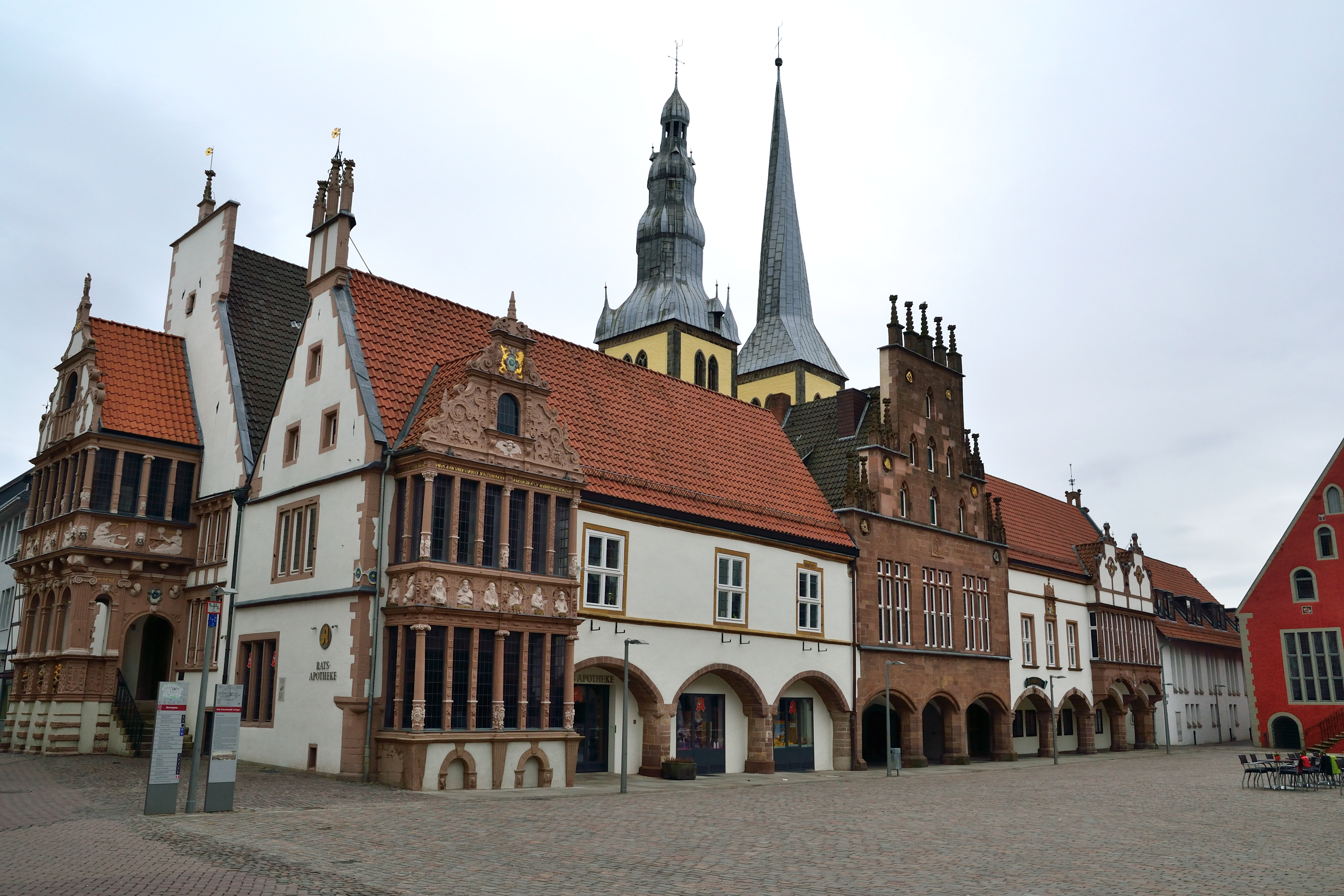 This is a photograph of an architectural monument.It is on the list of cultural monuments of Lemgo Rathaus Lemgo, Gesamtansicht von Nordwesten